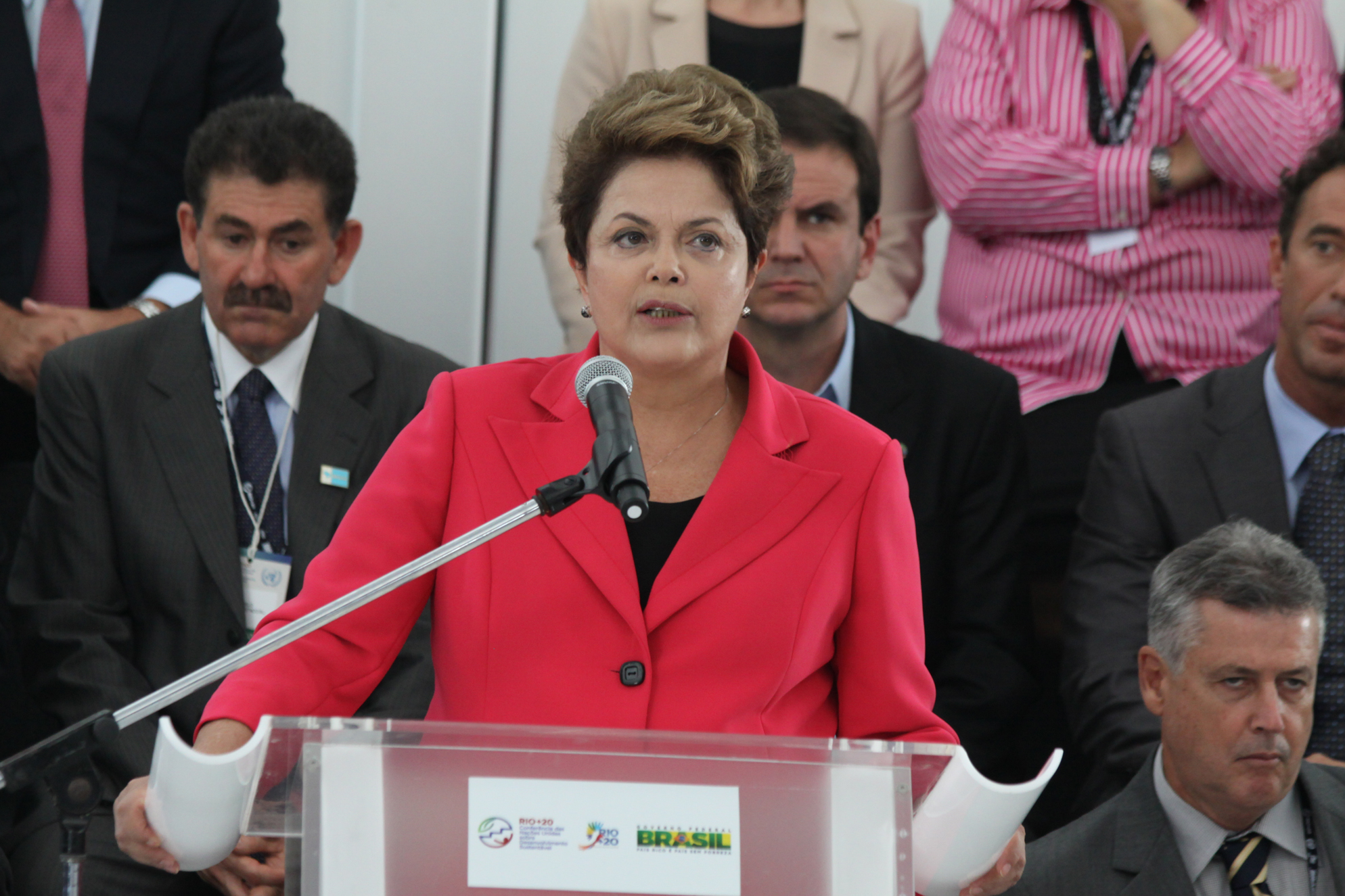 inauguração do Pavilhão Brasil pela Rio+20, a Conferência das Nações Unidas sobre Desenvolvimento Sustentável, com a presidenta Dilma Rousseff - Foto de Diego Reis/Ascom do MCTI